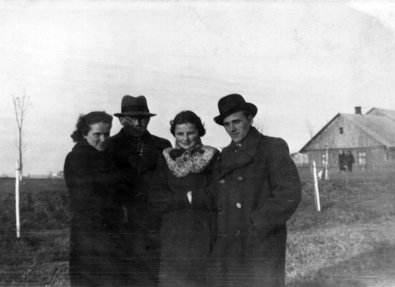 Tadeusz Dyło i Karl Chmiel - okolice Pilzna